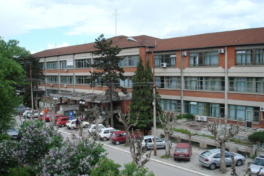 Општа болница у Горњем Милановцу.